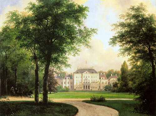 Paleis het Loo